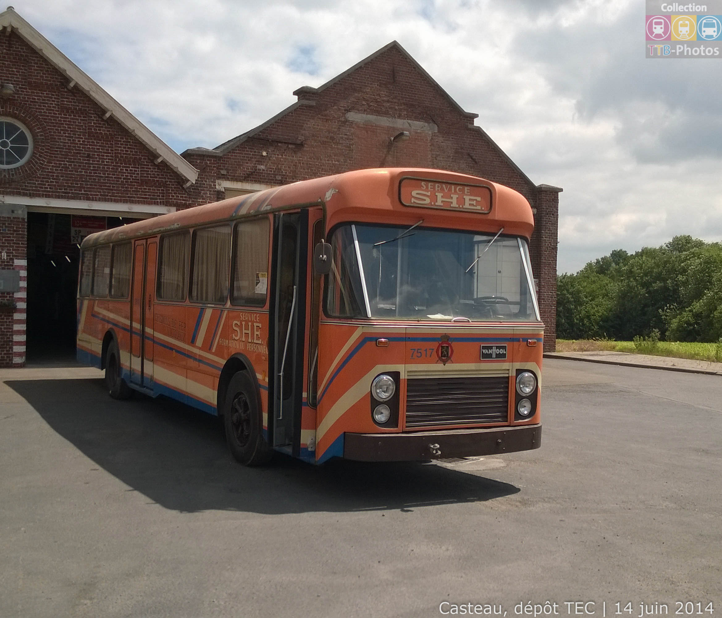 TEC Namur-Luxembourg (4).050 - Film Service S.H.E.Casteau, dépôt TEC - 14 juin 2014Van Hool 420 HA St.6/1 ex-SNCV 3539, 7517 (27/03/1970)